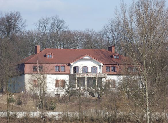 Dwór w Giebułtowie